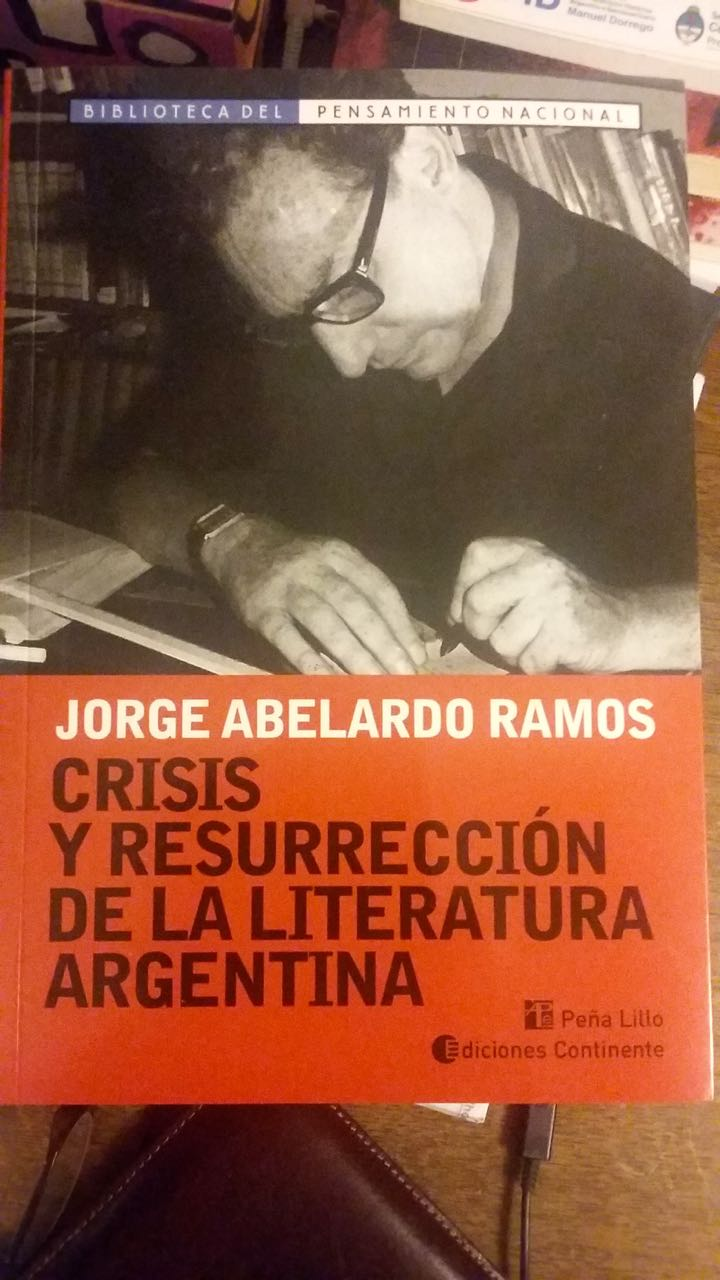 Tapa del Libro Crisis y Resurrección de la Literatura Argentina